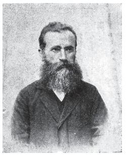 Кузман Шапарданов (1849 - 1893).